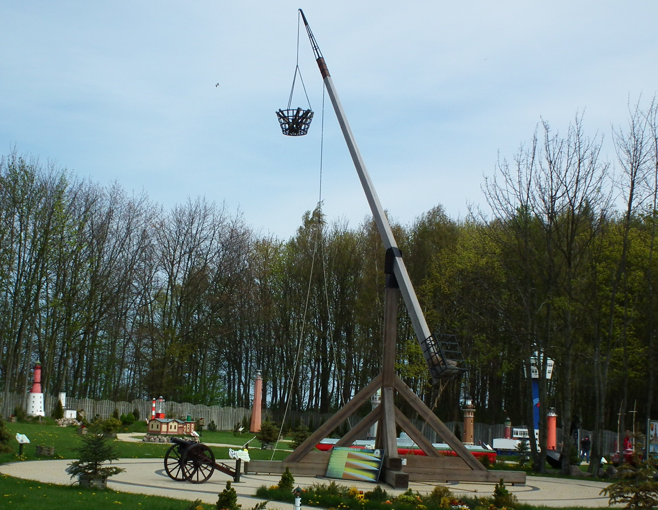 Niechorze - bliza w Parku Miniatur Latarni Morskich.